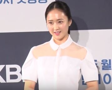 KBS 2TV 월화드라마 '국민 여러분!' 제작발표회가 1일 오후 서울 여의도 콘래드서울에서 열렸다.